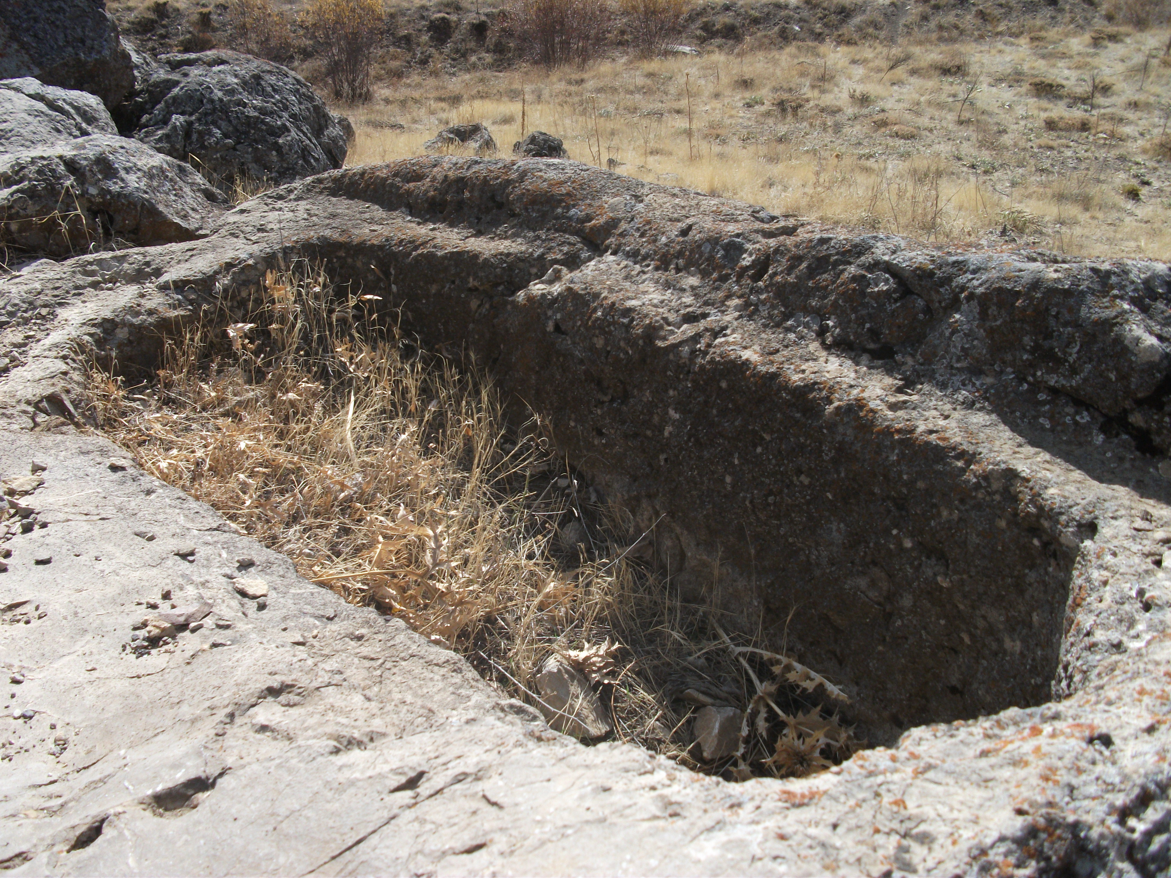 Roma İmparatoru Marcus Aurelius'un karısı Faustina'nın Toraman'da bulunan mezarı.